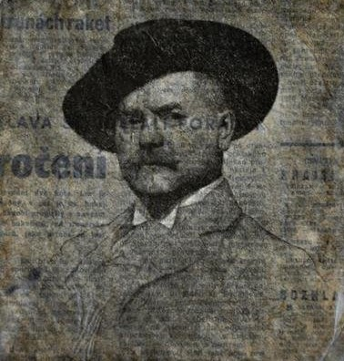 Josef Konstantin Beer (1862 - 1933), Malíř, restaurátor a sběratel umění.